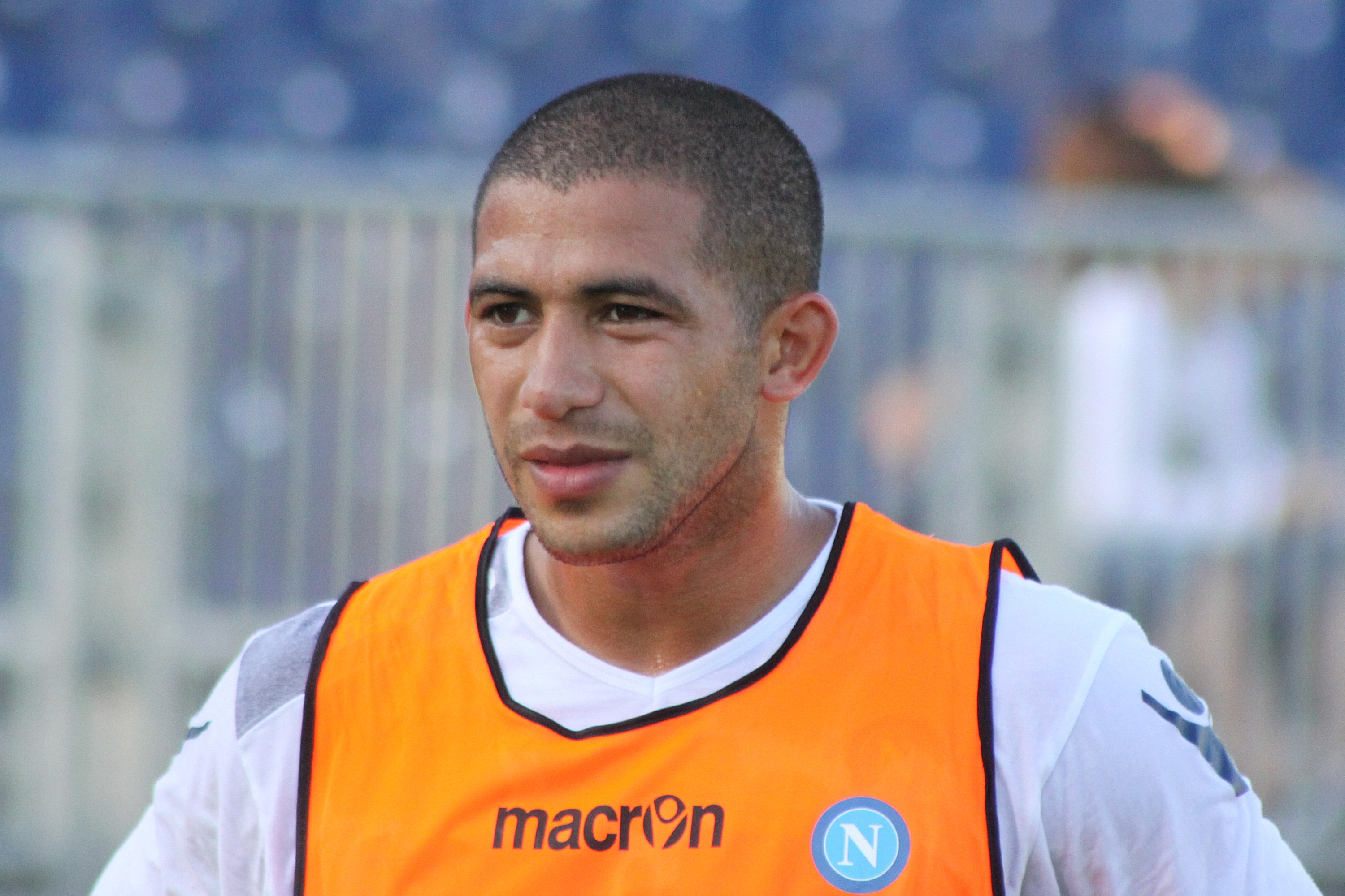 Walter Gargano - SSC Neapel (2) Walter Gargano - Società Sportiva Calcio Napoli